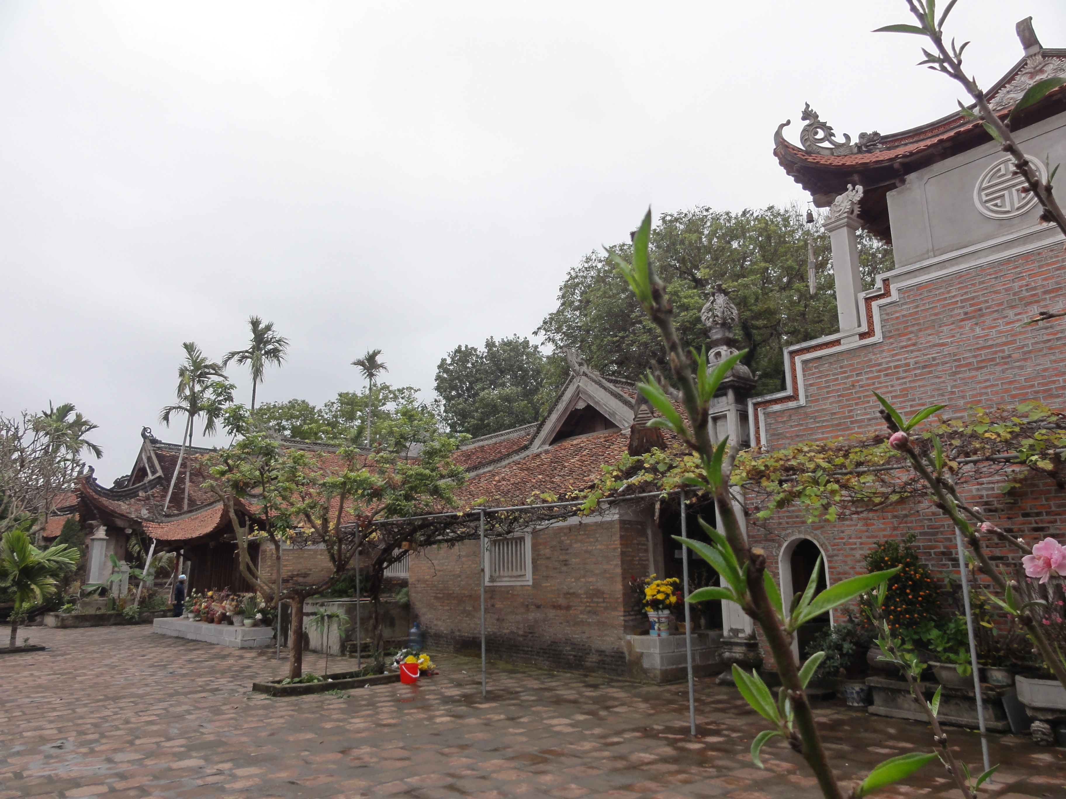 Chùa Vĩnh Nghiêm - Yên Dũng - Bắc Giang